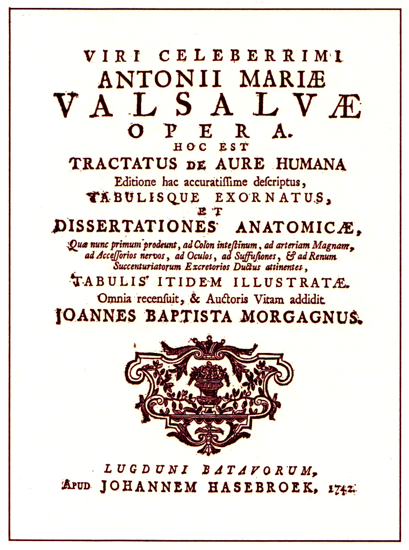 Frontespizio di: Antonio Maria Valsalva, Opera, Leiden 1742.